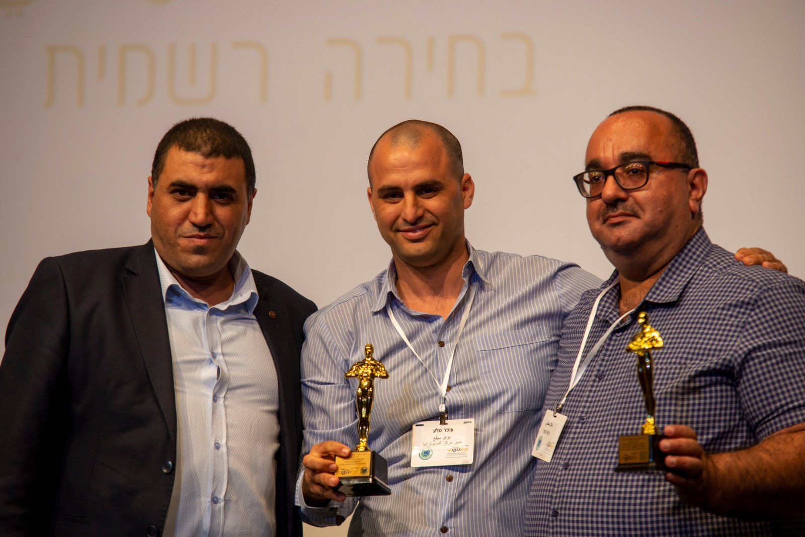 פסטיבל קולנוערבי. ג'לאל ספדי, מנהל מינהל חברה ונוער בחברה הערבית במשרד החינוך, עופר סלע, יזם חברתי, העומד בראש המרכז הארצי לוידאותרפיה וסמיר מחאמיד, ראש עיריית אום אל פאחם.